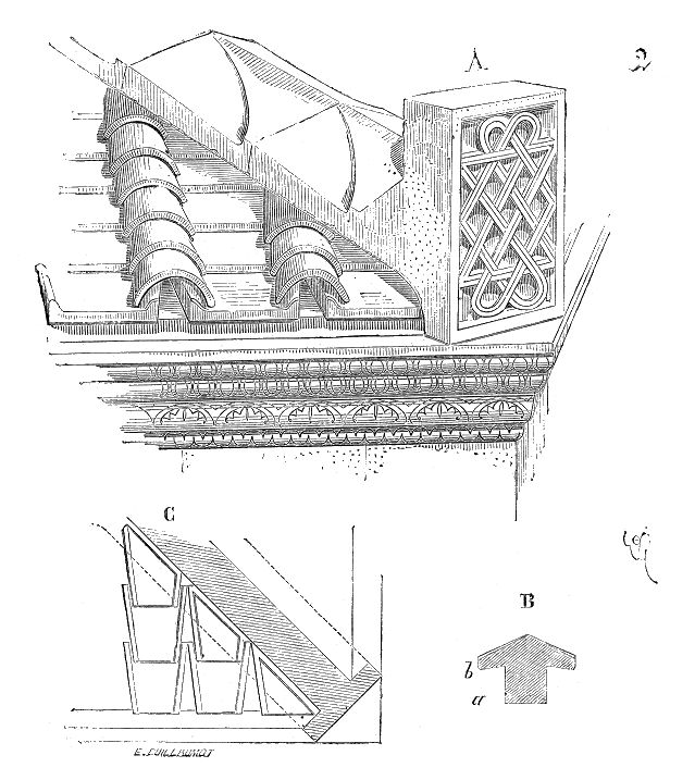 ... La figure 2 explique la disposition de ces arêtiers de pierre, terminés à leur extrémité inférieure par un antéfixe A tenant au premier morceau, lui donnant du poids et de l'assiette à l'angle de la corniche. En B est tracé le profil de l'arêtier, et en C son plan, avec la position des tuiles-canal à rebords. Les tuiles biaises étaient moulées exprès pour la place ou simplement coupées. L'espace ab était suffisant pour loger l'épaisseur de la tuile-canal plate et de la tuile couvre-joints. Sur le dos de l'arêtier, une entaille e rejetait l'eau de pluie sur la couverture et empêchait qu'elle ne lavât les joints, simplement garnis de ciment. Si ce système de couverture était entièrement posé sur des charpentes sans voûtes sous-jacentes, il n'était pas possible d'employer les arêtiers de pierre que donne la figure 2; ces arêtiers devaient être, comme les tuiles des pans, de terre cuite. Alors, pour les constructions faites avec soin, on fabriquait des tuiles d'arêtiers spéciales, en raison de la pente de la toiture ...